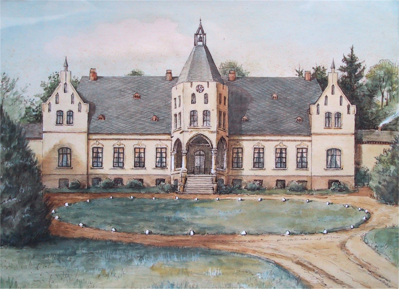 Herrenhaus Grammow, Mecklenburg (Aquarell)